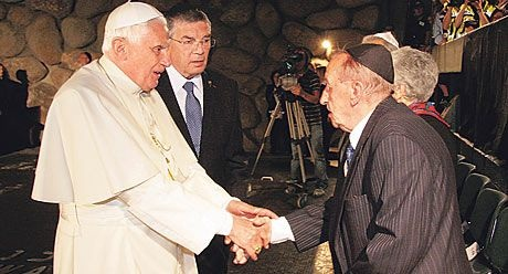 ביקורו של האפיפיור, שנת 2009